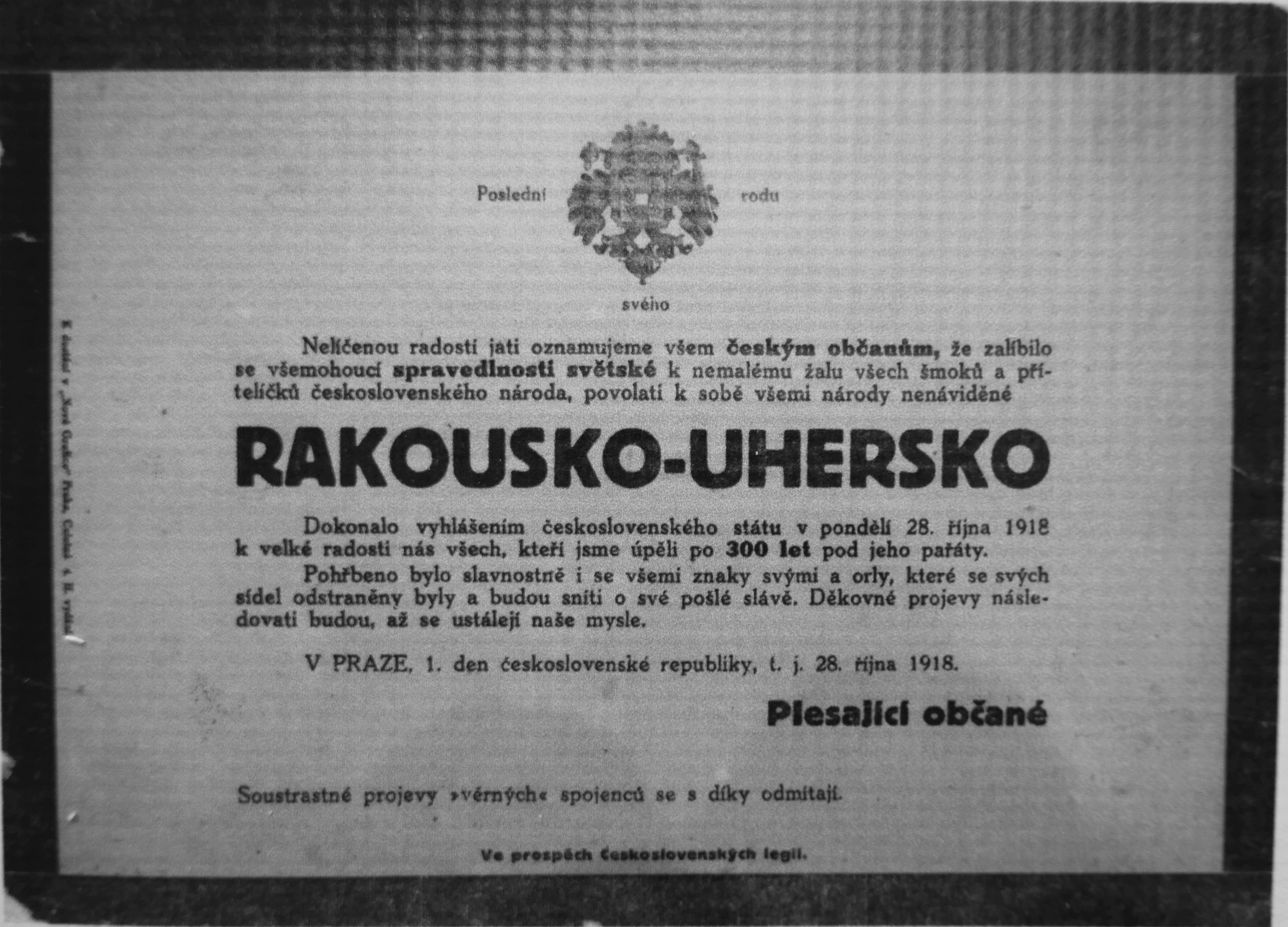 Nelicenou radosti jati oznamujeme vsem ceskym obcanum ze zalibilo se vsemohouci spravedlnosti svetske k nemalemu zalu vsech smoku a pritelicku ceskoslovenseho naroda, povolati k sobe vsemi narody nenavidene Rakousko-Uhersko Praha 28 rijna 1918